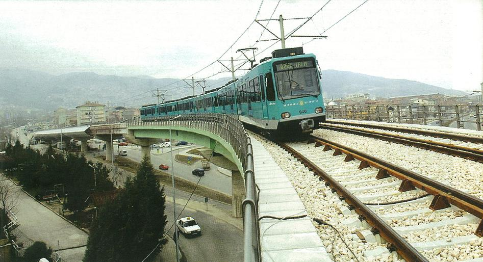 Bursa